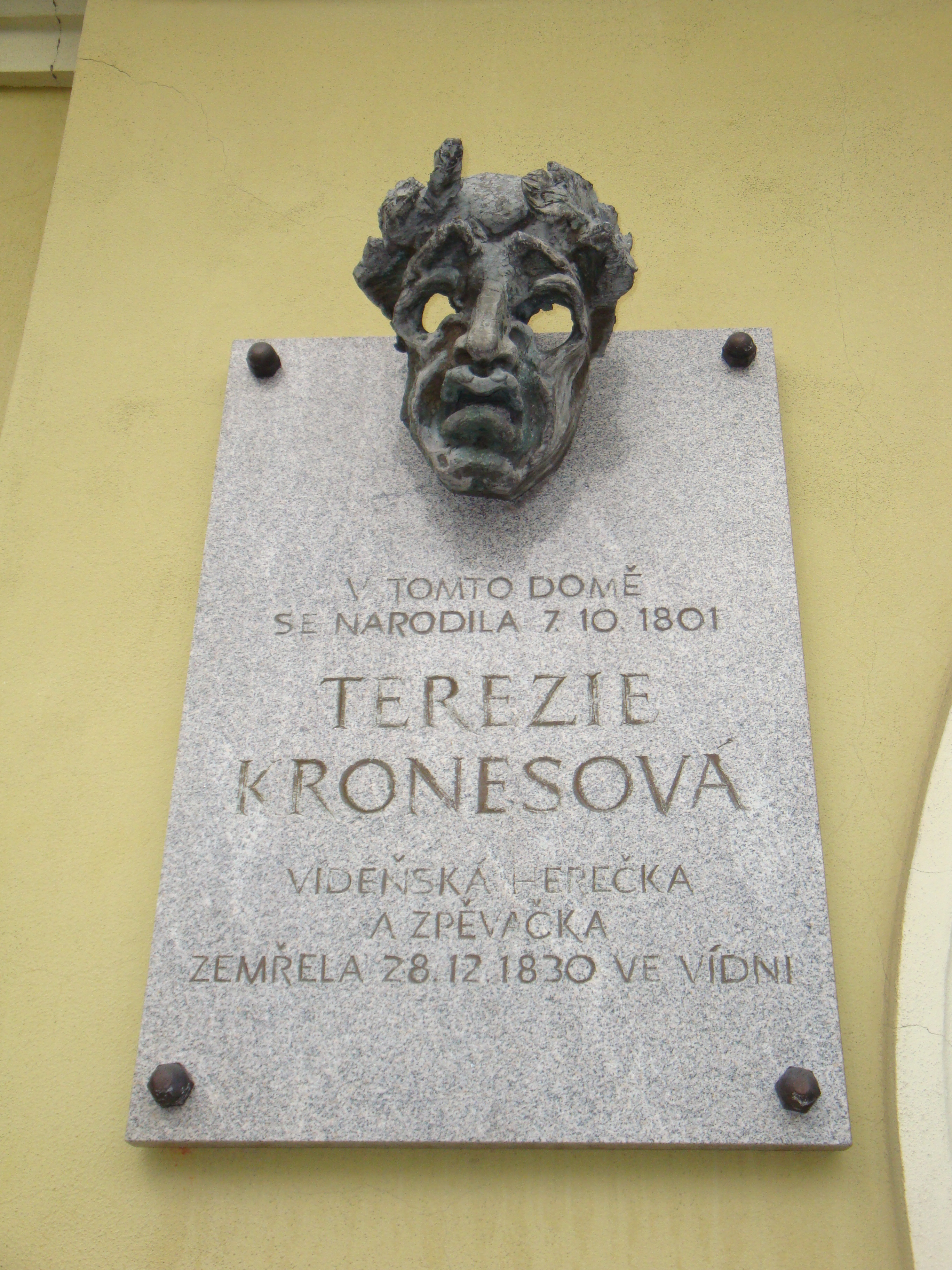 Rodný dům Terezy Kronesové na Náměstí Míru v Bruntále